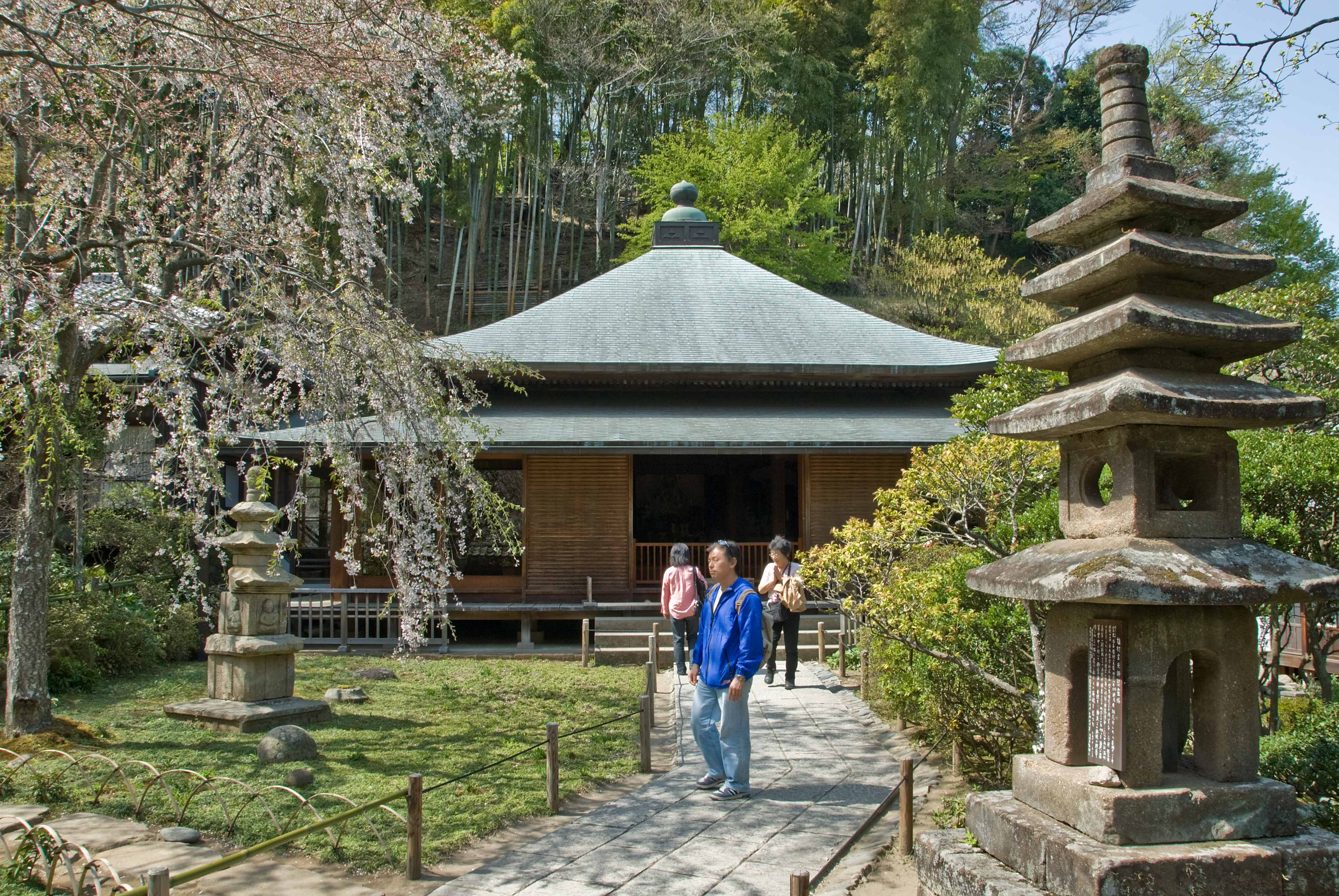 Tokei-ji, Kamakura. Main Hall